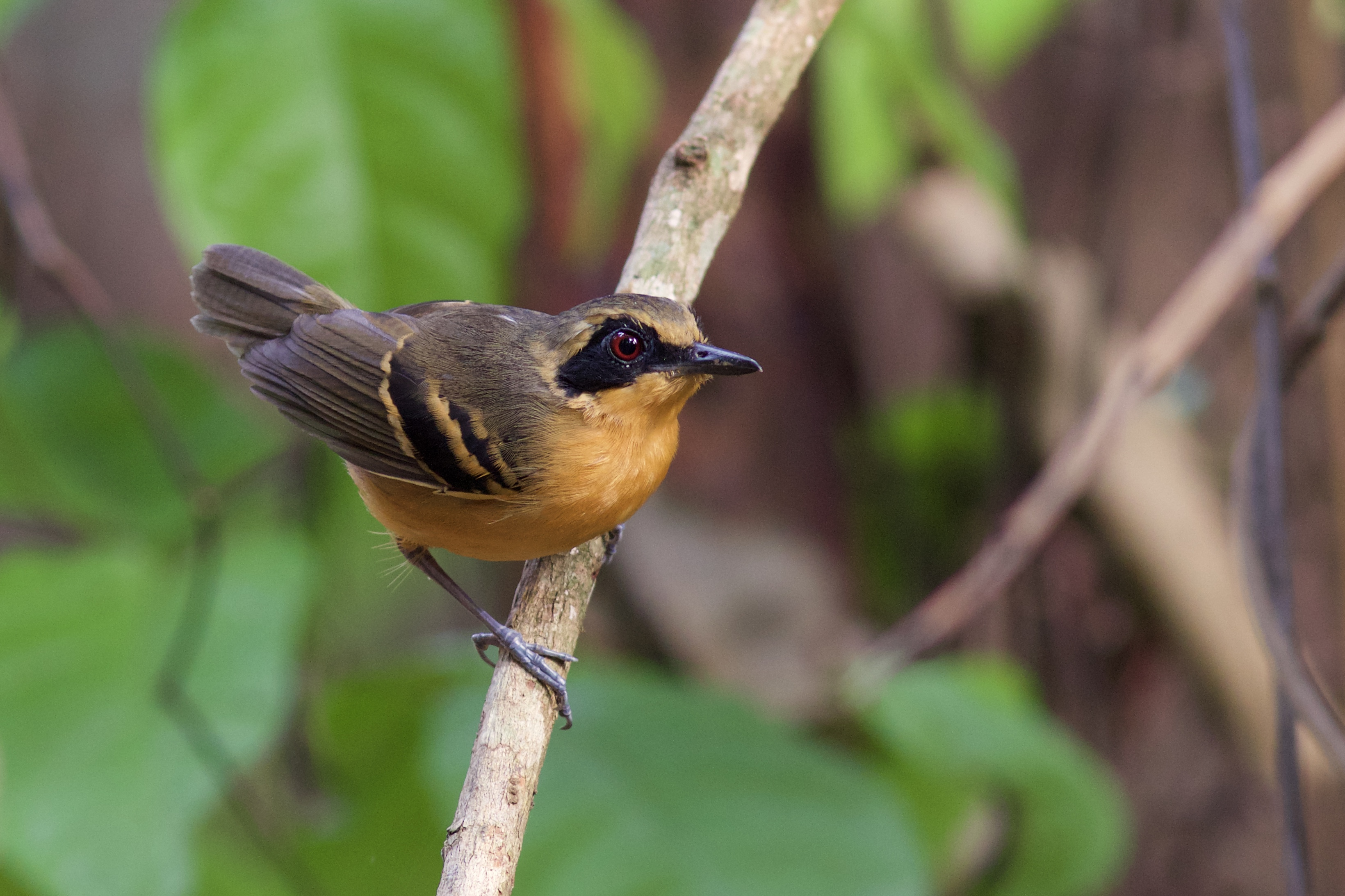 Fêmea do formigueiro-de-cara-preta (Myrmoborus myotherinus) fotografado no assentamento Tapete Verde na cidade de Parauapebas - PA.